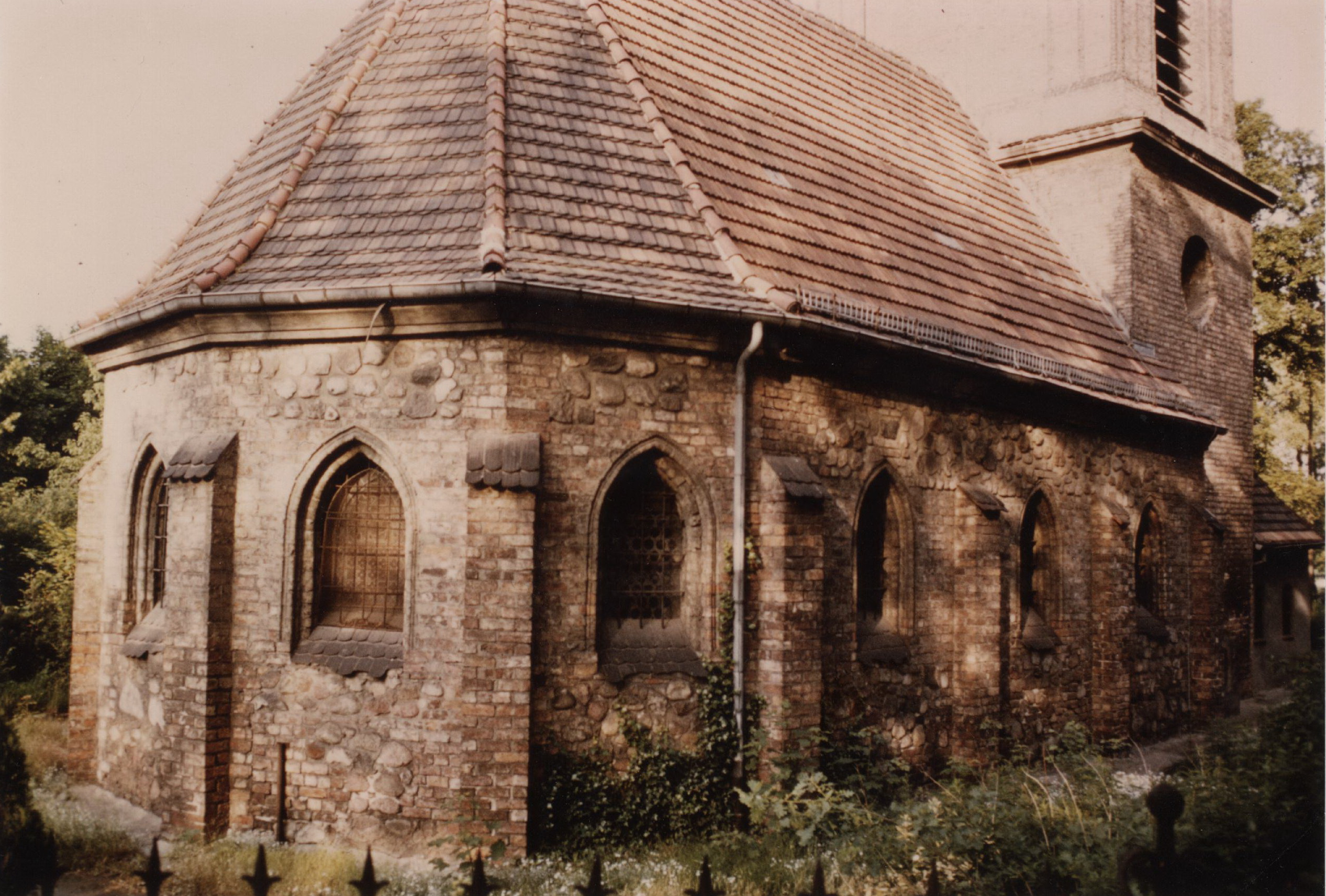 Anblick der Dorfirche Stralau von Nordosten: Langhaus und fünfeckiger Polygonalchor, mit dem typischen spätgotischen Mischmauerwerk.